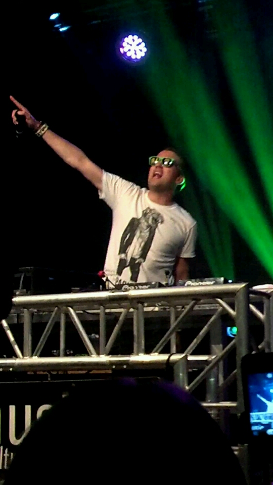 DJ Antoine am 27.04.13 live im Pahlazzo, Phalen.